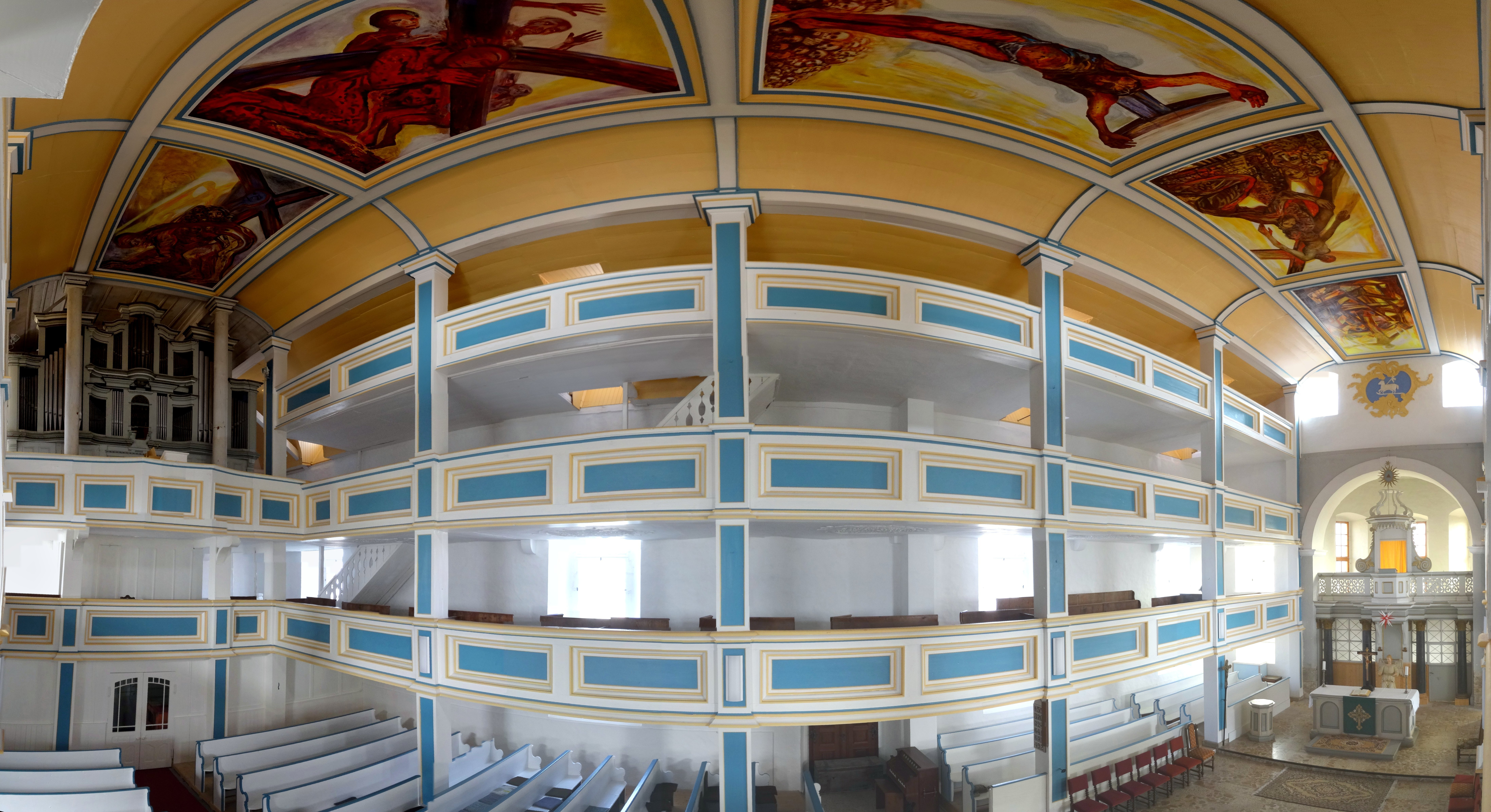 Innenraumpanorama St. Crucis Wölfis. Kirchenneubau 1736 durch den herzoglichen Oberbaumeister Johann Erhard Straßburger. Das Deckengemälde der Kirche wurde 2008 vom Maler Gert Weber geschaffen und stellt den Kreuzweg Jesu dar.